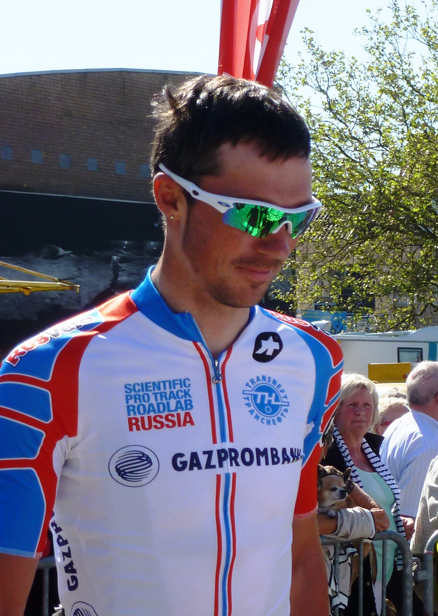 Alexander Serov (Alexander Serow), russischer Radrennfahrer, Belgien-Rundfahrt 201